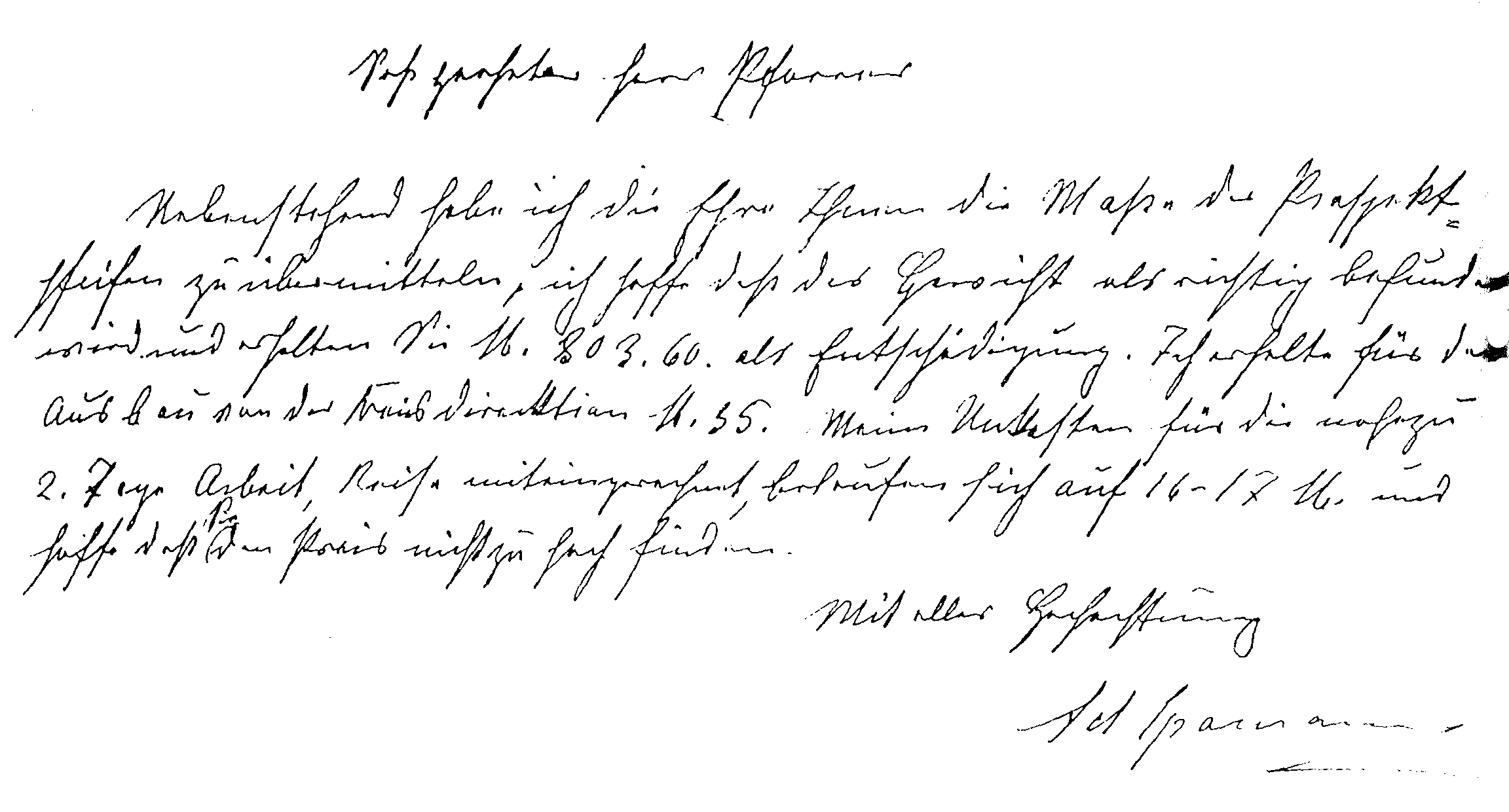 Mitteilung des Orgelbauers Adrian Spamann über die im Rahmen der Metallspende des deutschen Volkes im Ersten Weltkrieg vorgesehene Entschädigung von 803,60 Mark für die Zinnpfeifen der Orgel in der Pfarrkirche Schwerdorff. Transkription: Sehr geehrter Herr Pfarrer Nebenstehend habe ich die Ehre Ihnen die Maße der Prospekt- pfeifen zu übermitteln, ich hoffe daß das Gewicht als richtig befunden wird und erhalten Sie M. 803.60. als Entschädigung. Ich erhalte für den Ausbau von der Kreisdirektion M. 55. Meine Unkosten für die nahezu 2. Tage Arbeit, Reise miteingerechnet, belaufen sich auf 16-17 M. und hoffe daß Sie den Preis nicht zu hoch finden. Mit aller Hochachtung Ad Spamann Nach dem Ausbau wurden die Pfeifen in der Volksschule gelagert und gerieten zunächst in Vergessenheit, sodass sie nach Kriegsende wieder eingebaut werden konnten. Das Ergebnis der in der Abbildung nicht dargestellten Berechnung lautet in der Transkription: Im Ganzen 51 Pfeifen welche ein Gewicht von 122 Kilo haben Für den Ausbau der Pfeifen wird 35 M vergütet, für jedes Kilo 6.30. M., macht zusammen M 803.60.